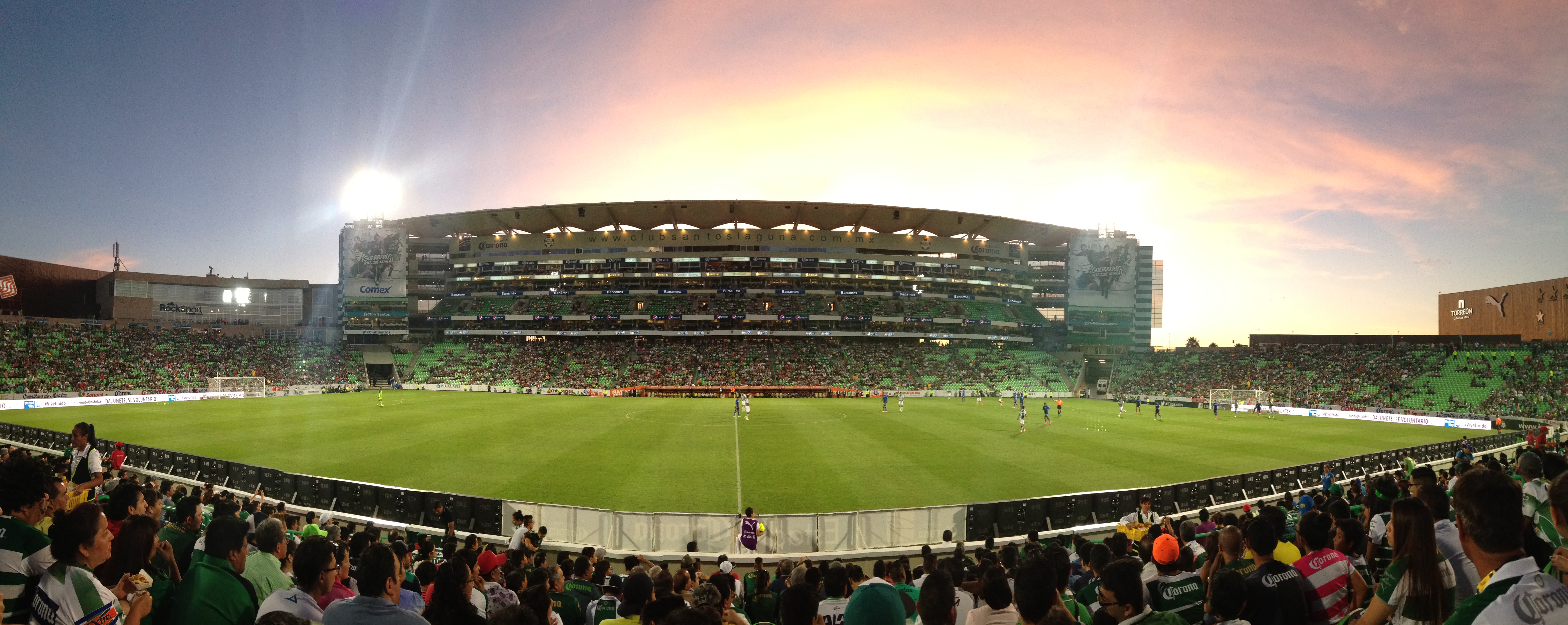 Santos vs Puebla Cl '15